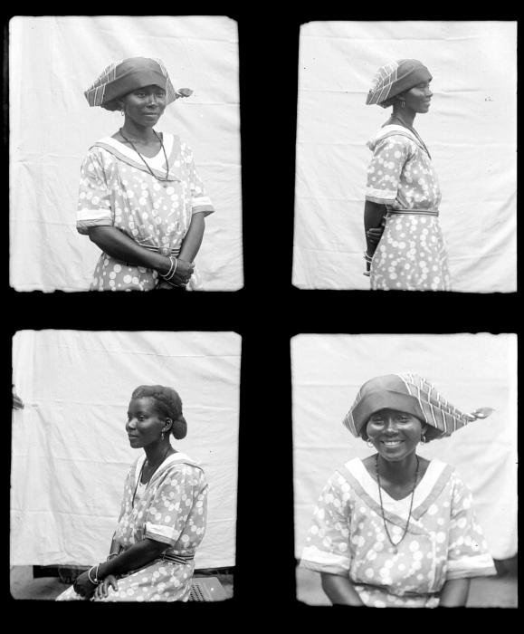 Negatief. Studioportretten van een Creoolse vrouw gekleed als kotomisi